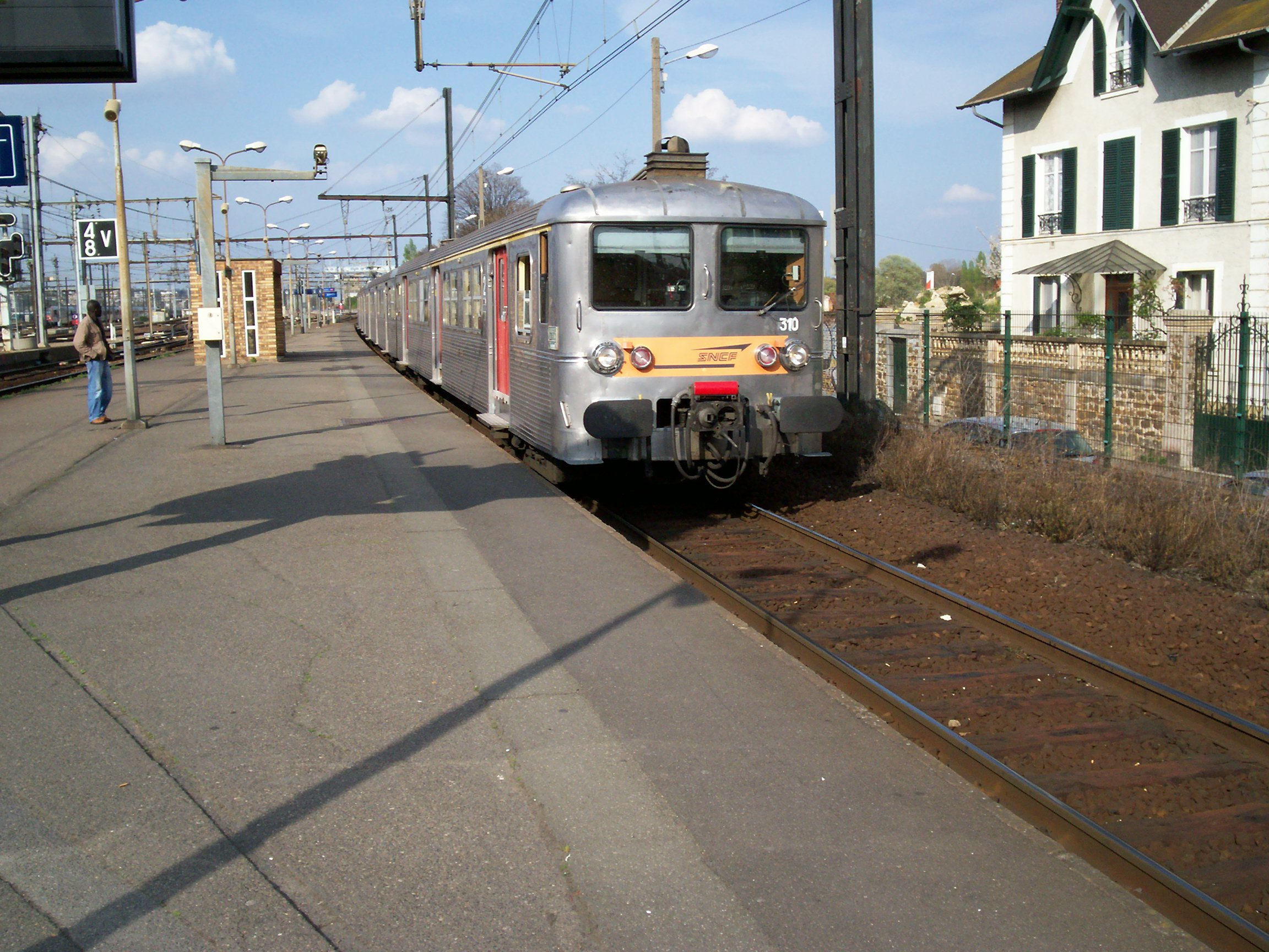 Train Z5300 assurant une mission sur le RER D